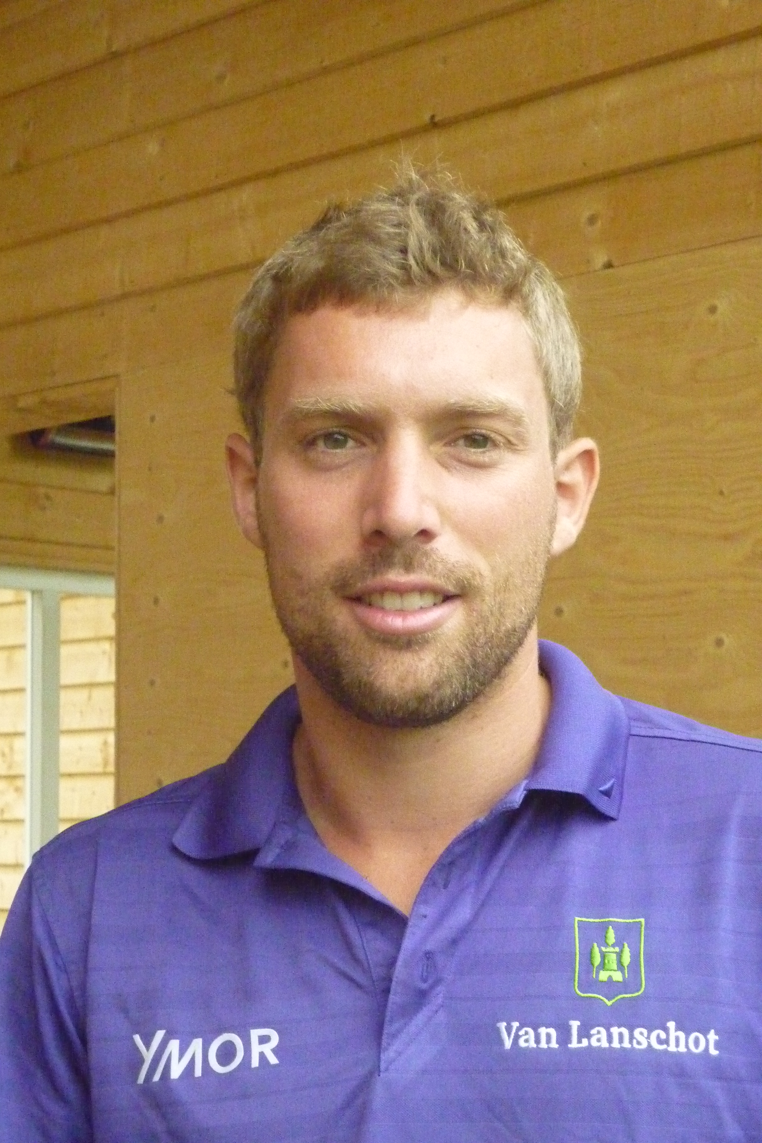 Floris de vries op het Nationaal Open 2013